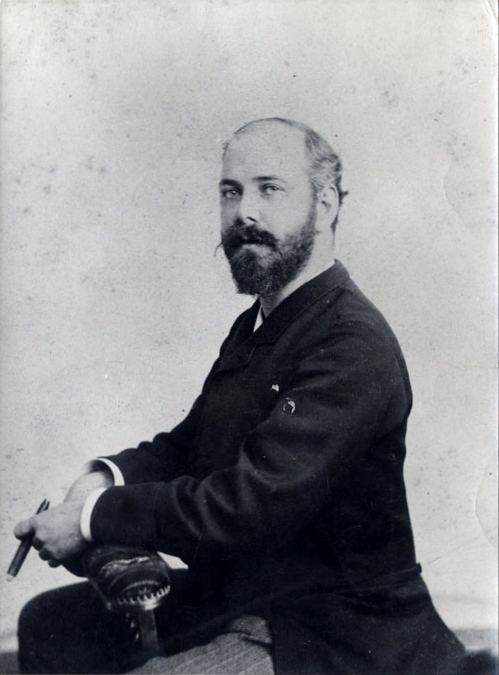 El político y diplomático chileno Carlos Morla Vicuña fotografiado en París en el estudio ubicado en 21 Rue du Vieux Colombier.